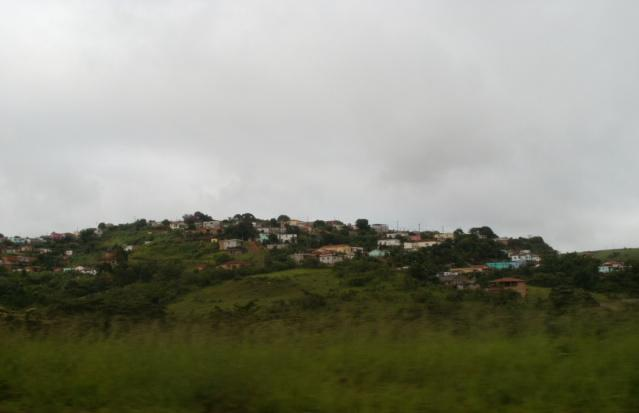 Vista parcial de Madre de Deus de Minas, Minas Gerais, Brasil.